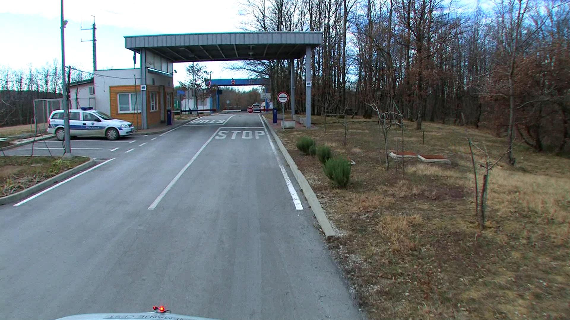 Mejni prehod za obmejni promet Brezovica pri Gradinu med RS in RH